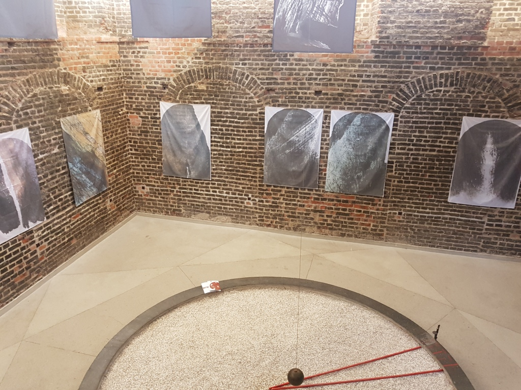 Małgorzata Chomicz wystawa 2018, wieża Radziejowska, wieża Radziejowskiego, wahadło Foucaulta